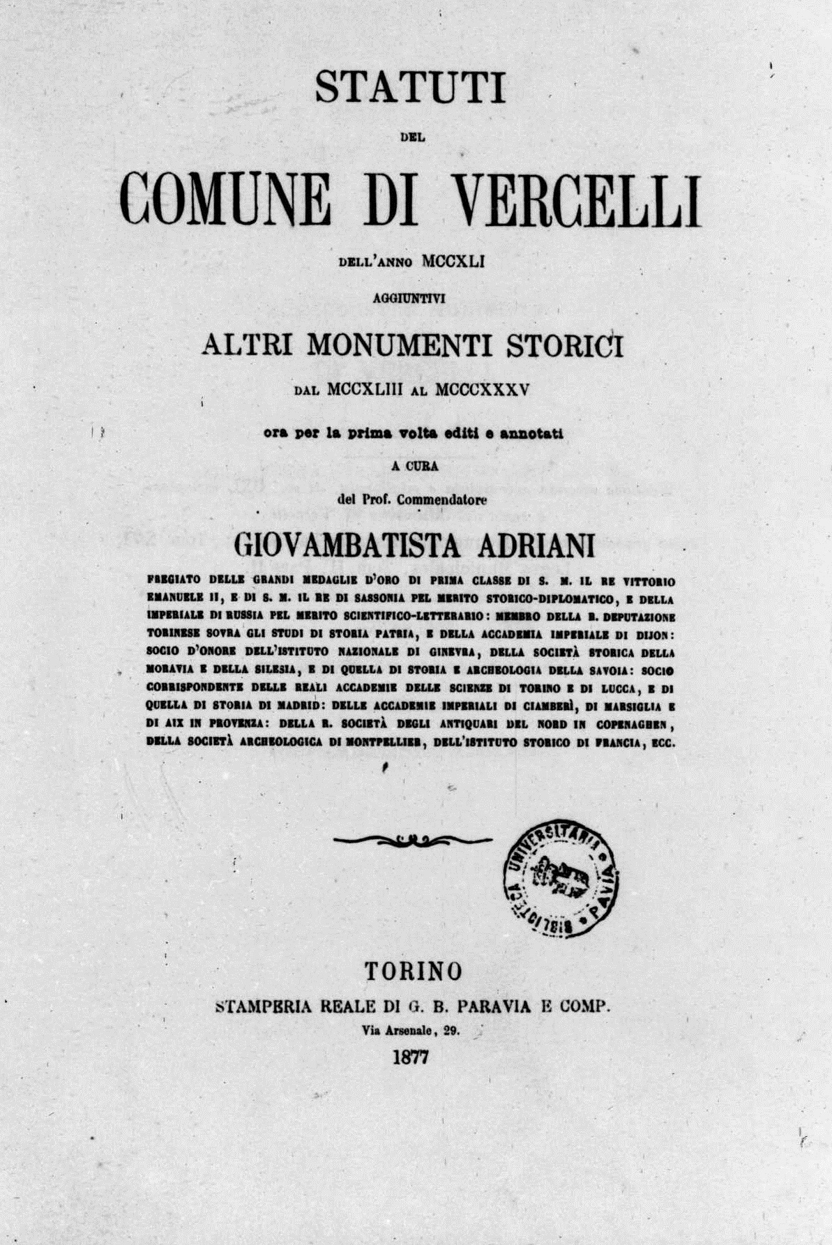 Frontespizio